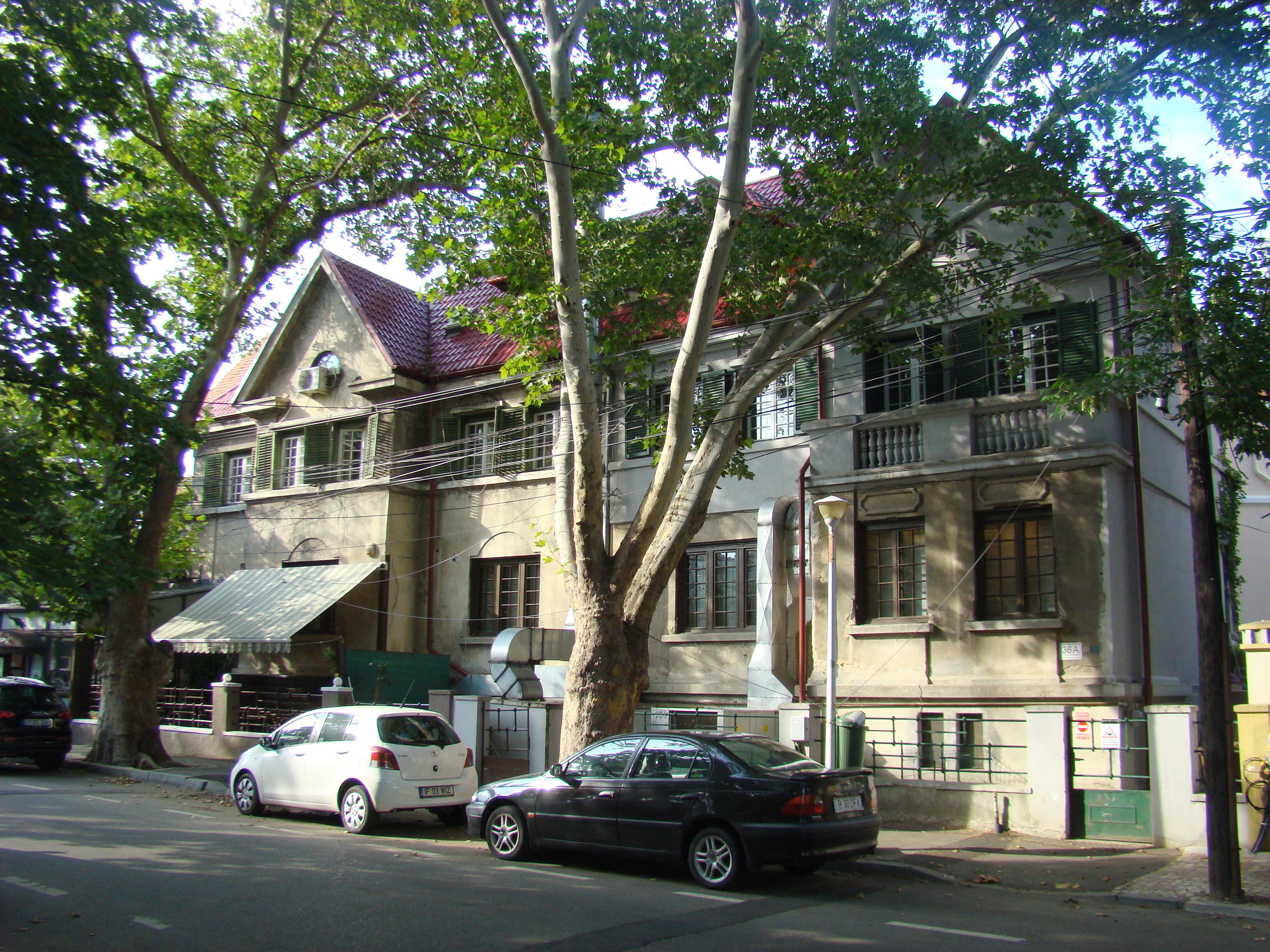 Casă cu arhitectură deosebită, monument istoric, str.Aleea Alexandru, nr.36A-38